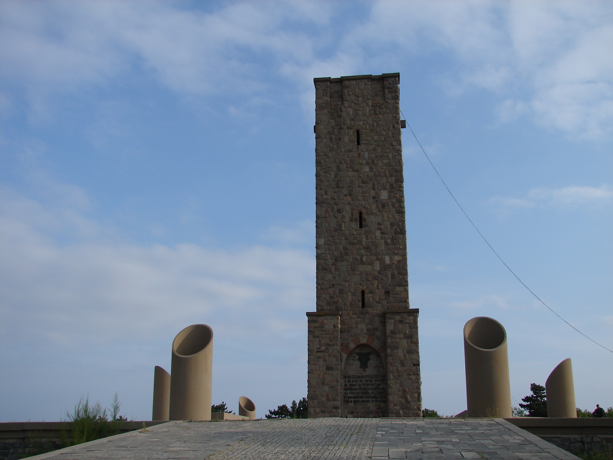 Gazimestan monument.